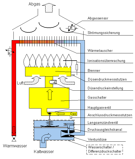 Durchlauf-Gaswasserheizer